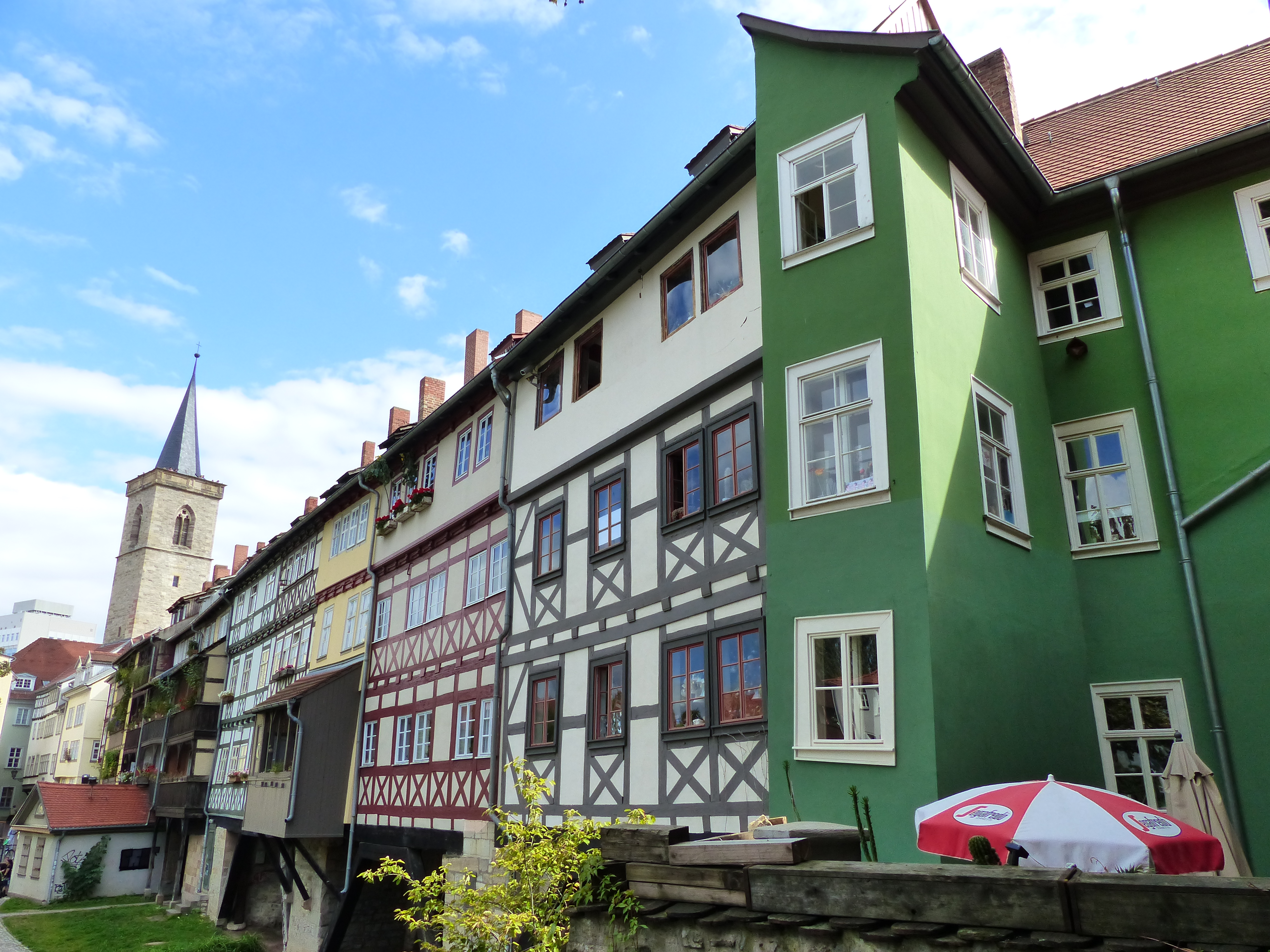 WLM-Fototour Erfurt 2014 Dieses Foto wurde im Rahmen der WLM-Fototour 2014 in Erfurt erstellt, die vom 29. bis 31. August 2014 zum Auftakt des Wettbewerbs Wiki Loves Monuments 2014 statt fand. The making of this document was supported by the Community-Budget of Wikimedia Germany. Krämerbrücke in Erfurt